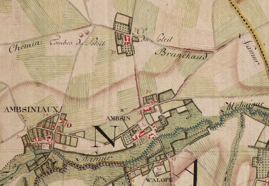 Extrait de la carte de Ferraris n° 134B